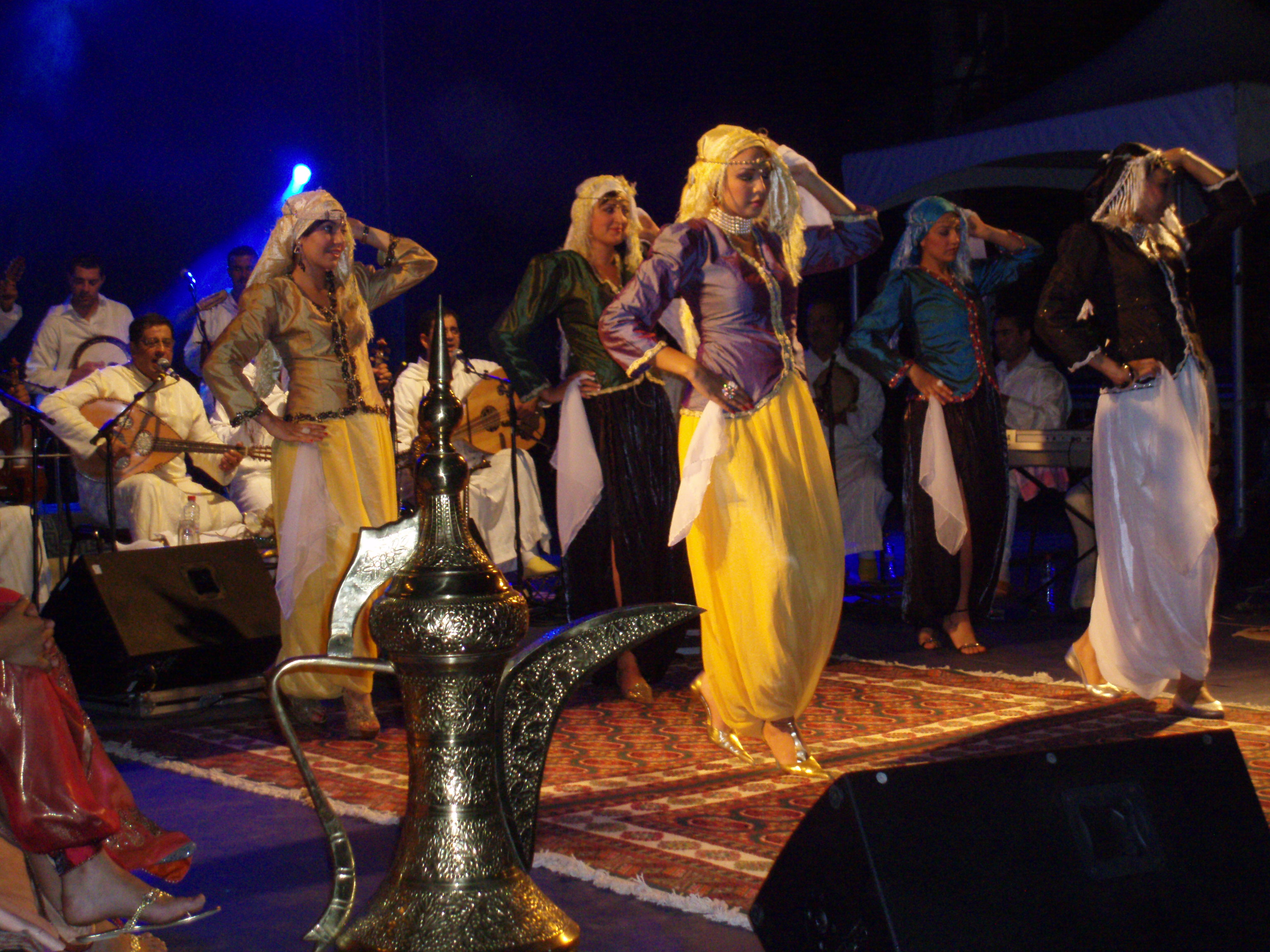 Nouri Koufi chanteur et musicien algérien